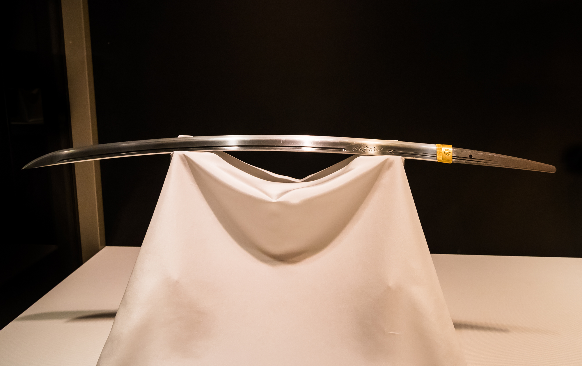 刀。無銘、相州貞宗。「名物 切刃貞宗」（重要文化財）。 14世紀、南北朝時代。